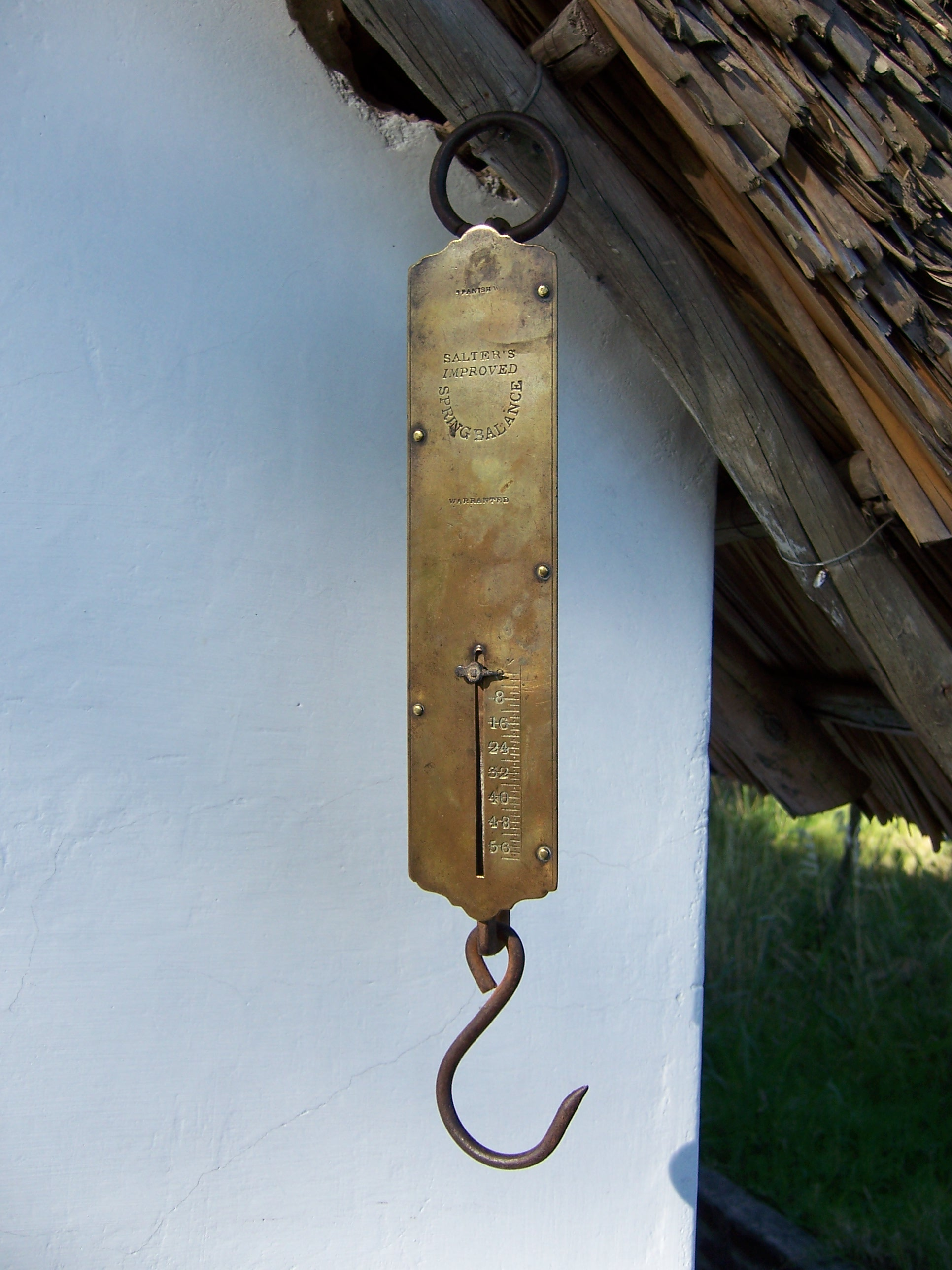 Dinamómetro de resorte (Spring scale).